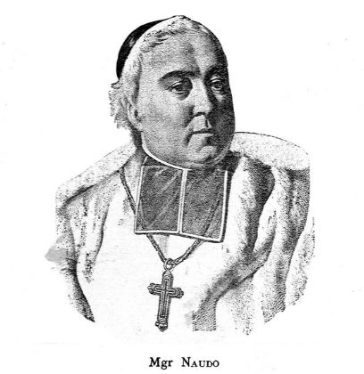 Portrait de Monseigneur Naudo (1794-1848).